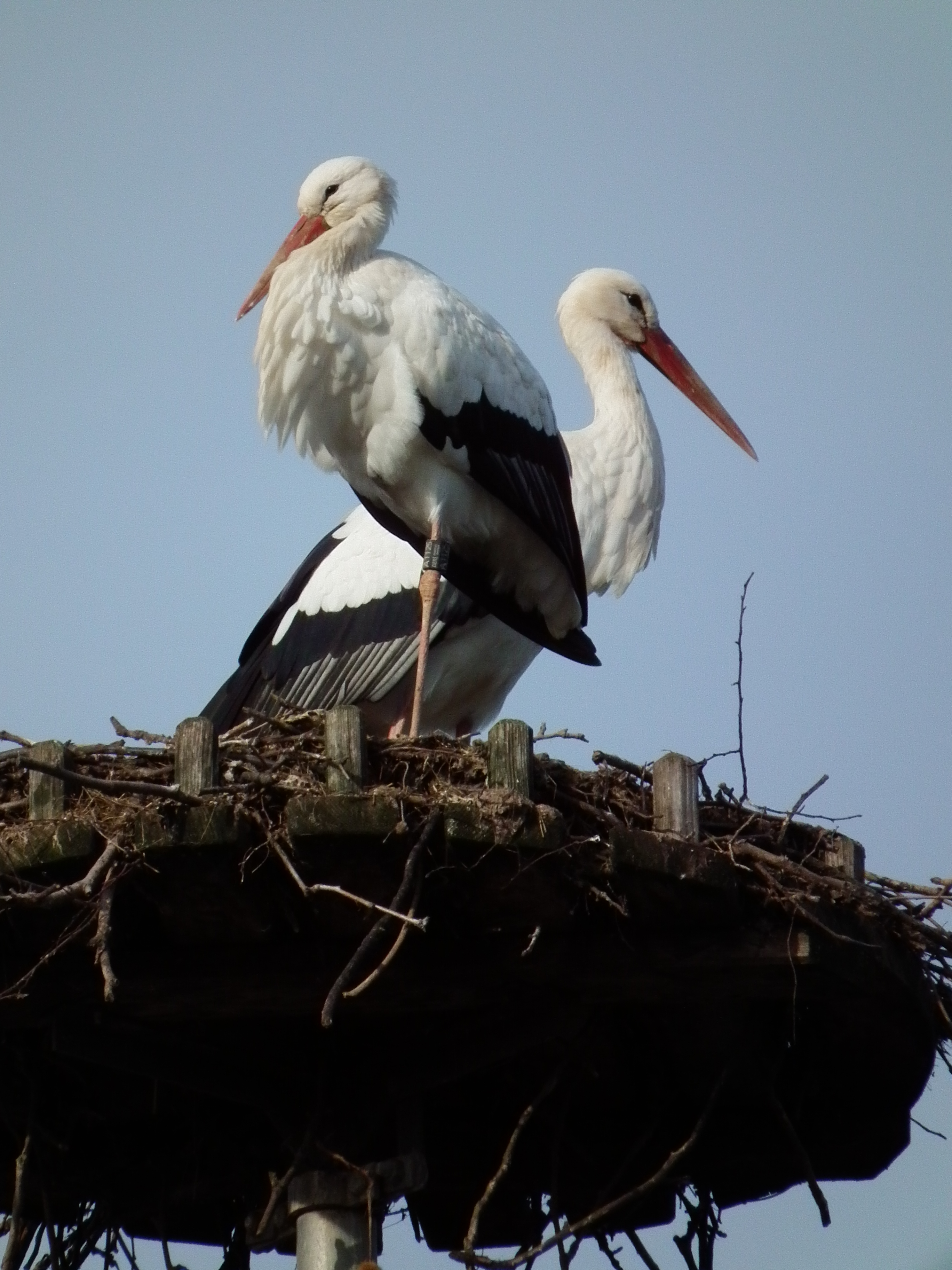 Weißstorchenpaar auf seinem Nest, fotografiert in Heidelberg (Baden-Württemberg, Deutschland)